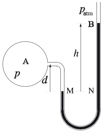 Manómetro abierto